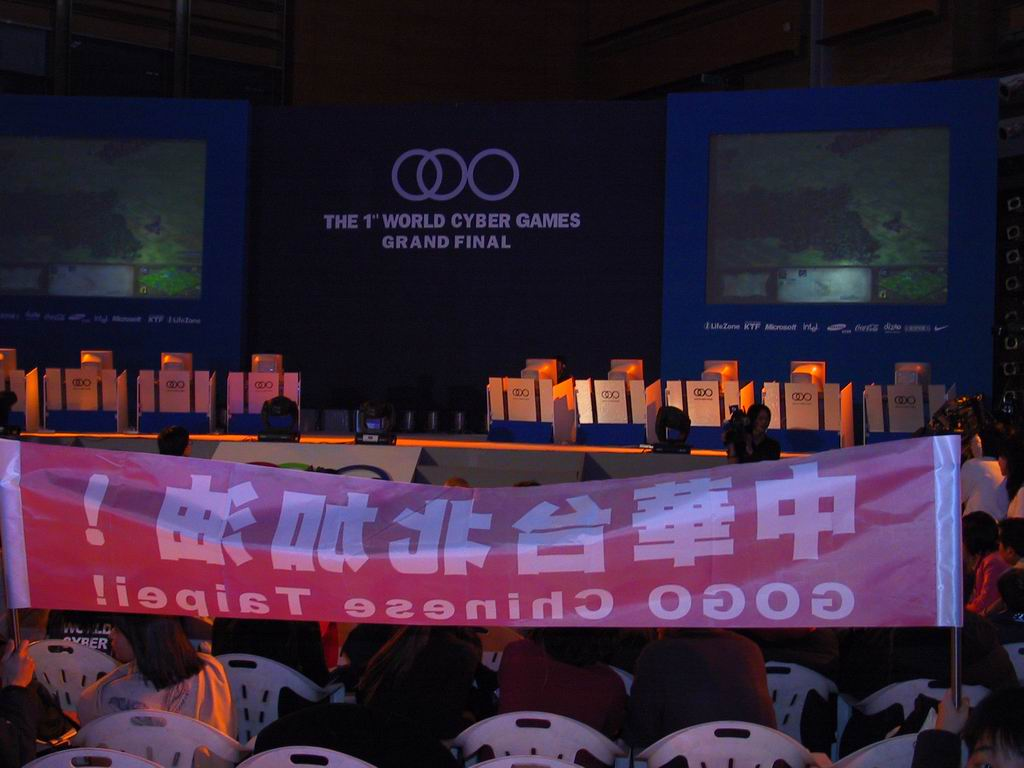 2001年第一屆WCG大賽 去韓國漢城採訪第一屆WCG比賽時拍攝，場景為台灣與韓國選手對戰。 以Canon G1拍攝。 Richy 16:30 2004年8月25日 (UTC)